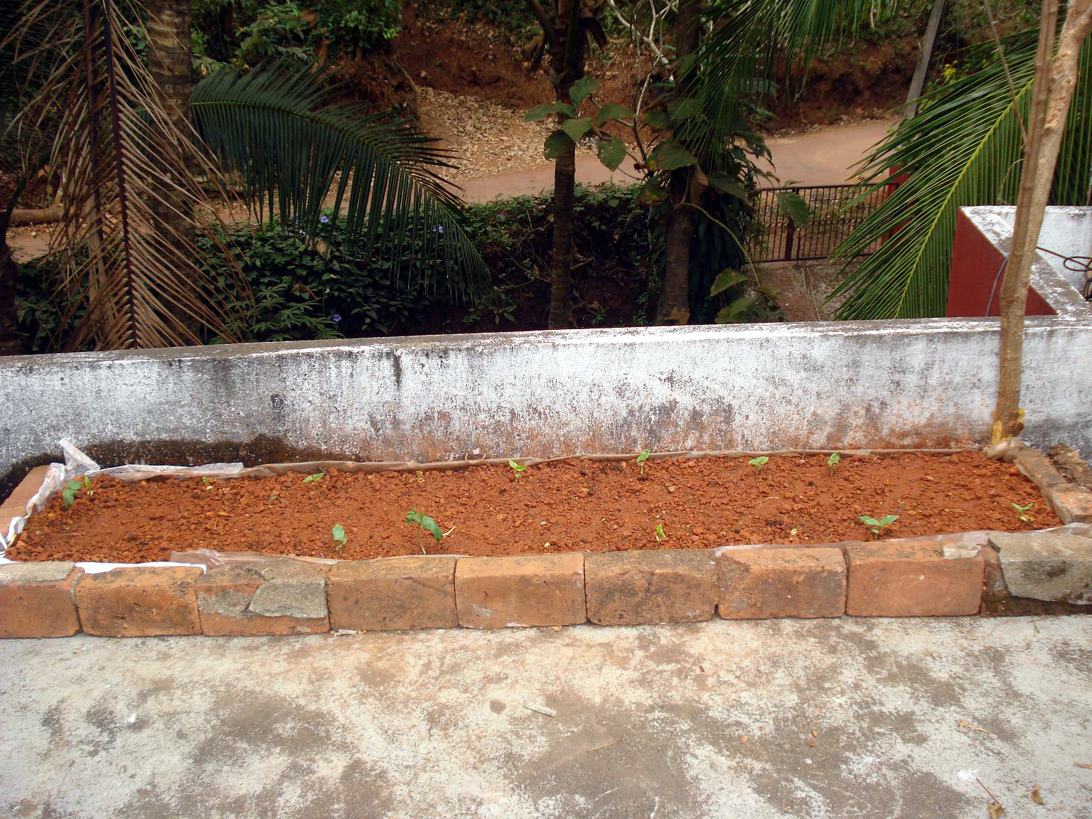 മട്ടുപാവിൽ കൃഷി ചെയ്യാൻ മണ്ണിട്ട് ഒരുക്കിയിരിക്കുന്നു.